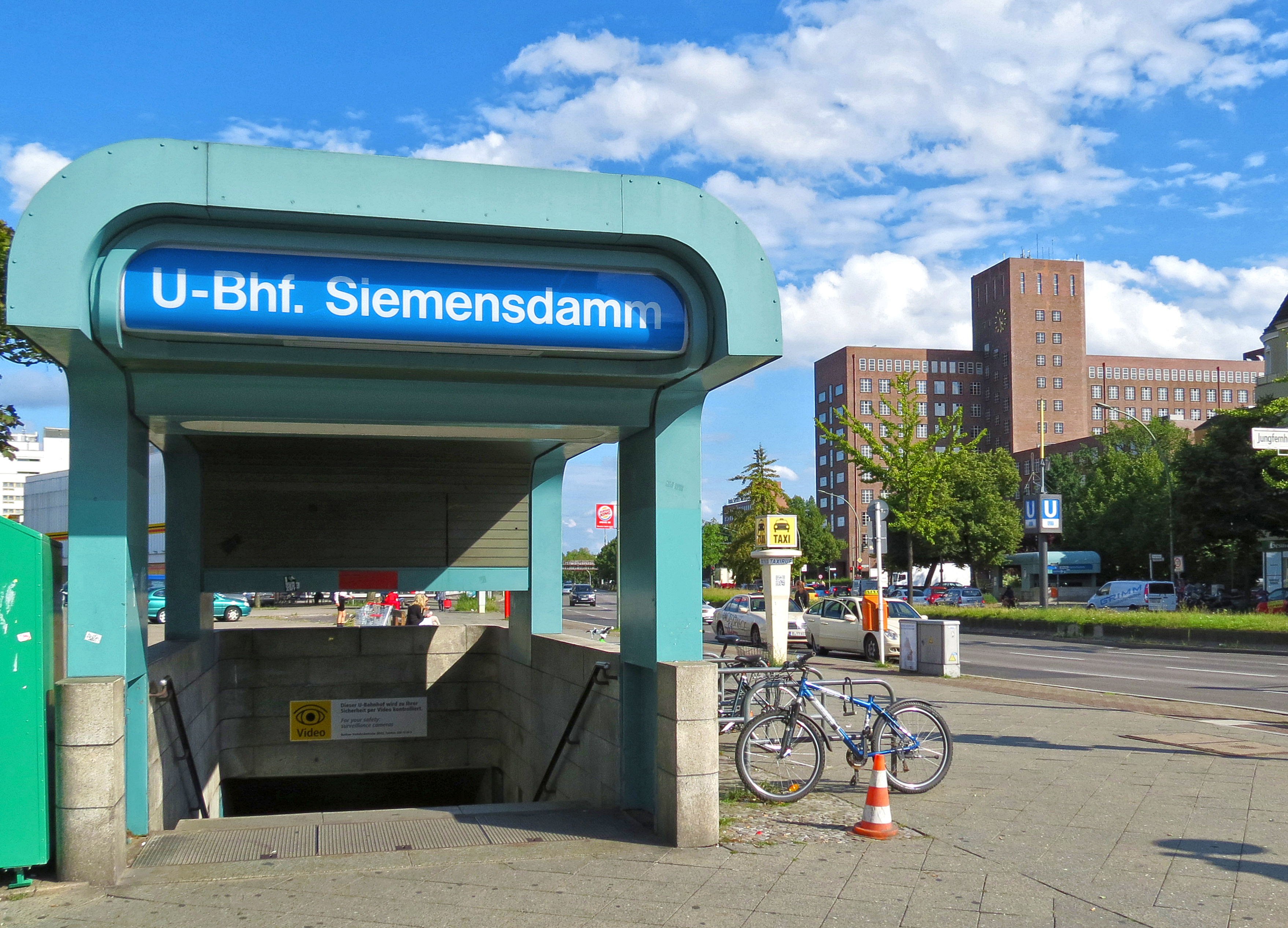 Eingang zum U-Bahnhof Siemensdamm an der Kreuzung Siemensdamm, Jungfernheideweg